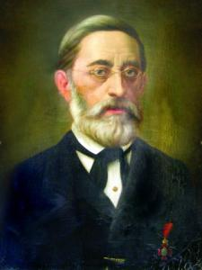 Josef Pfeiffer - dobový portrét